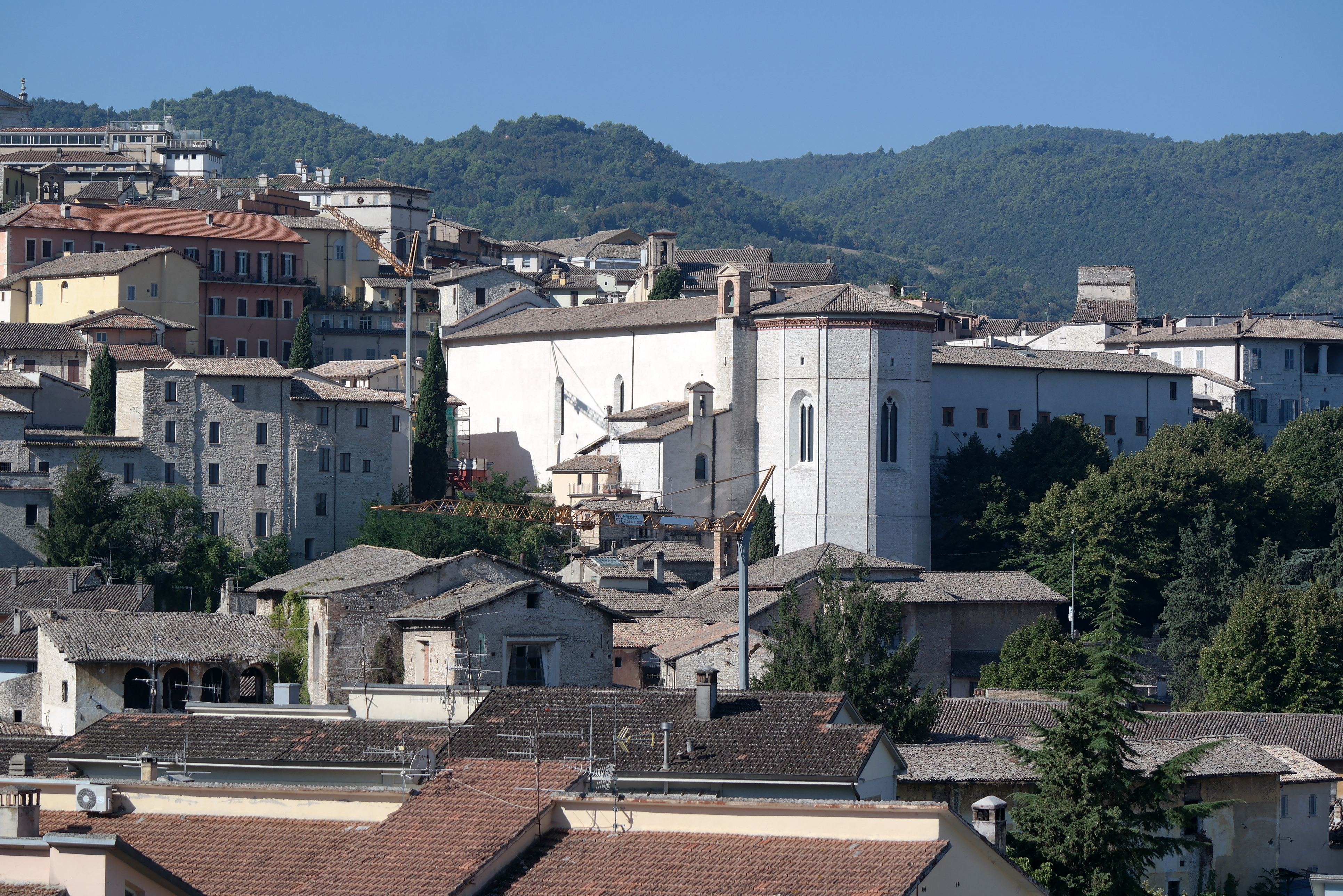 Abside dell'ex Chiesa di San Nicolò a Spoleto